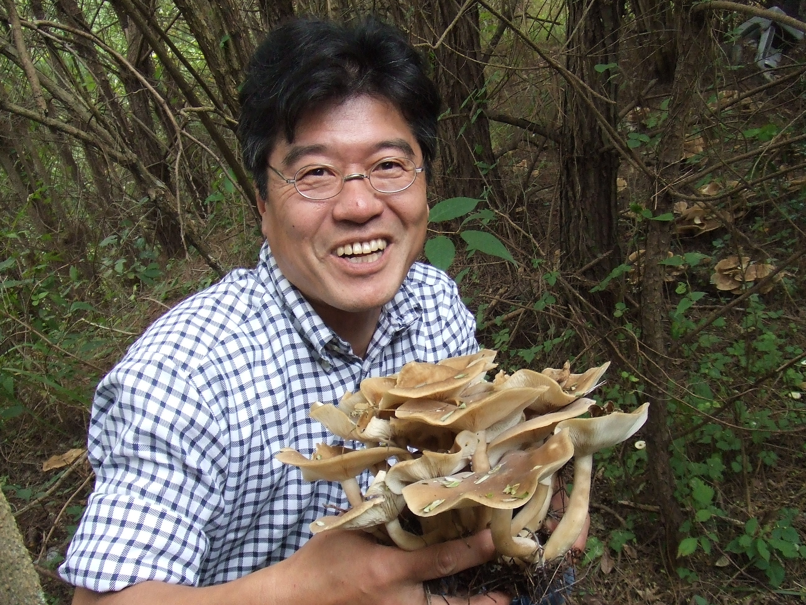 株式会社無添加住宅 代表取締役社長であり、 『無添加住宅』開発者である秋田憲司氏